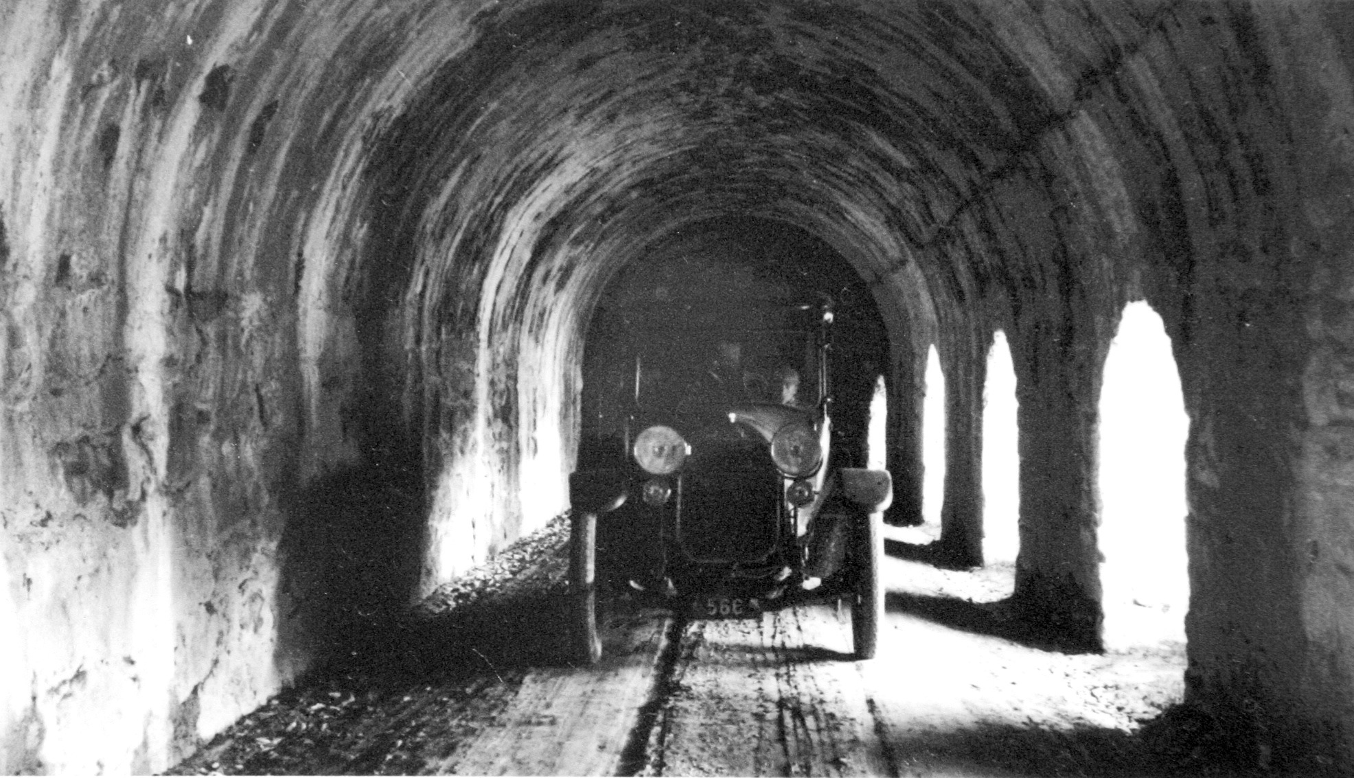 Splügengalerie